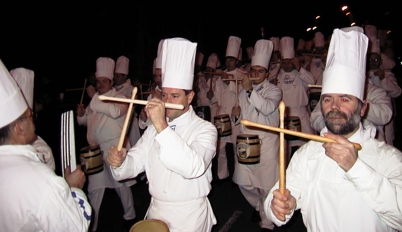 San Sebastian-Tamborrada Festival. Autor zdjęcia: SanSe